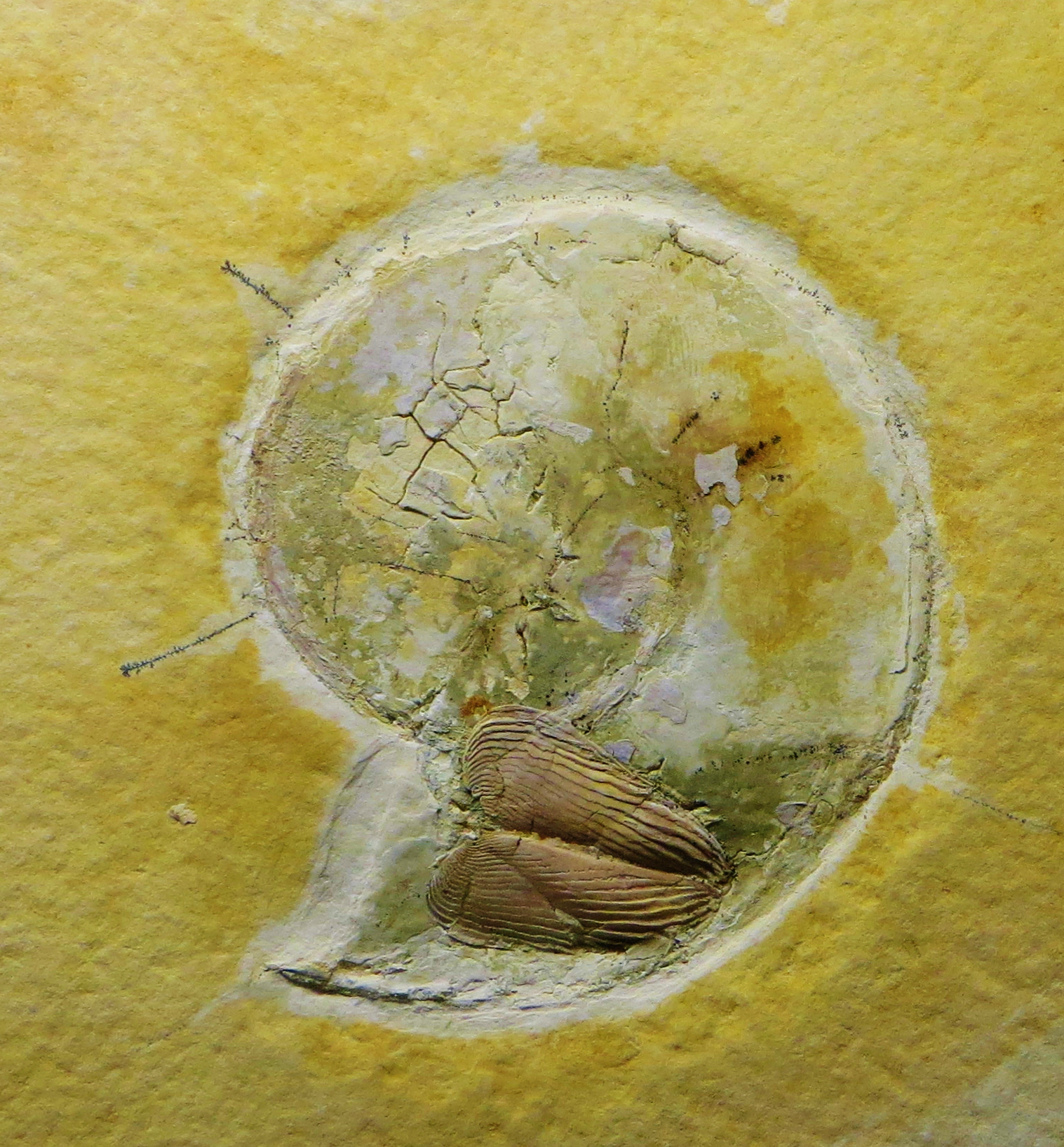 Fossil of Oppelia, an extinct ammonoid- Took the photo at Museo di Storia Naturale di Verona